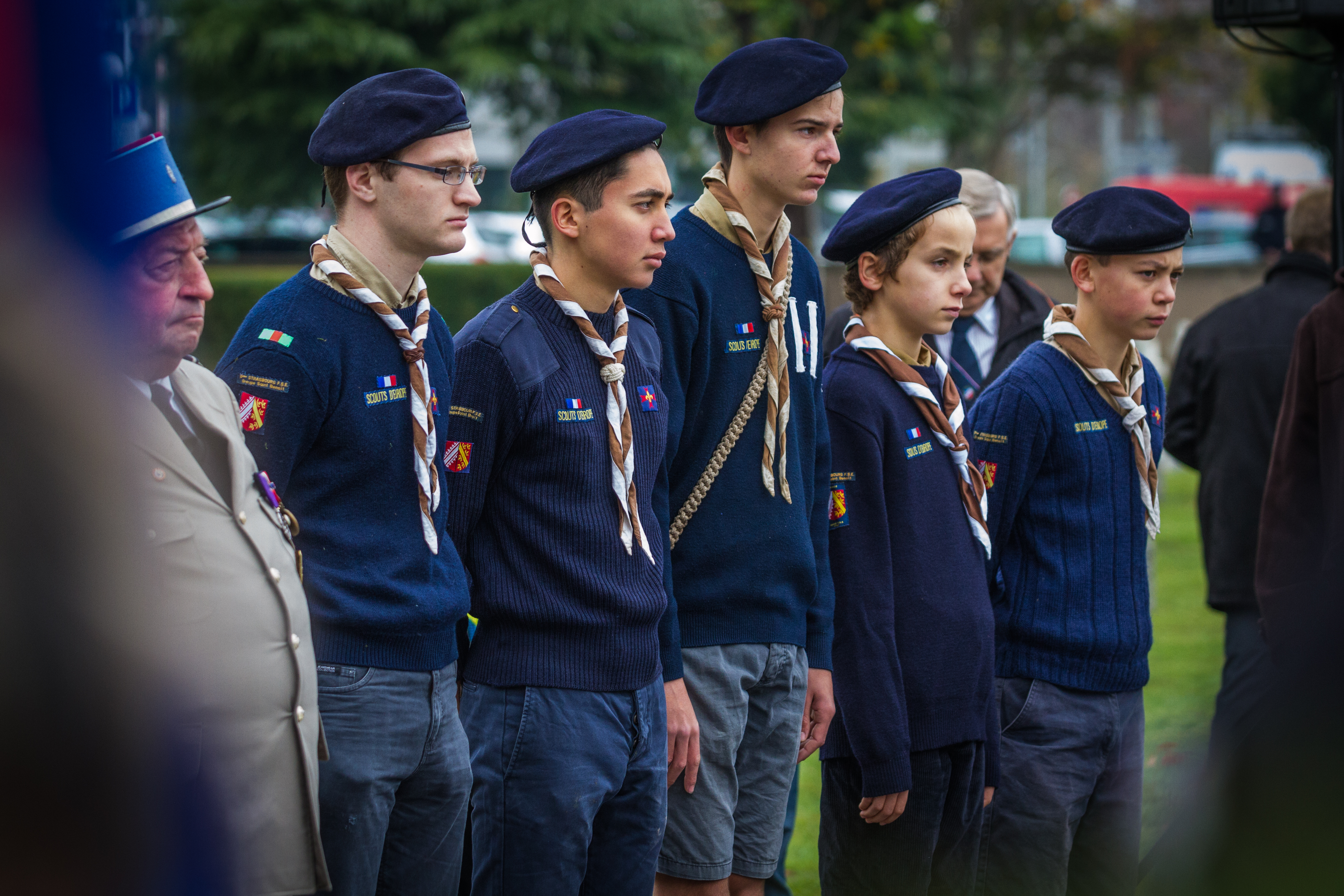 Strasbourg, nécropole nationale de Cronenbourg. Cérémonie du 1er novembre 2013.